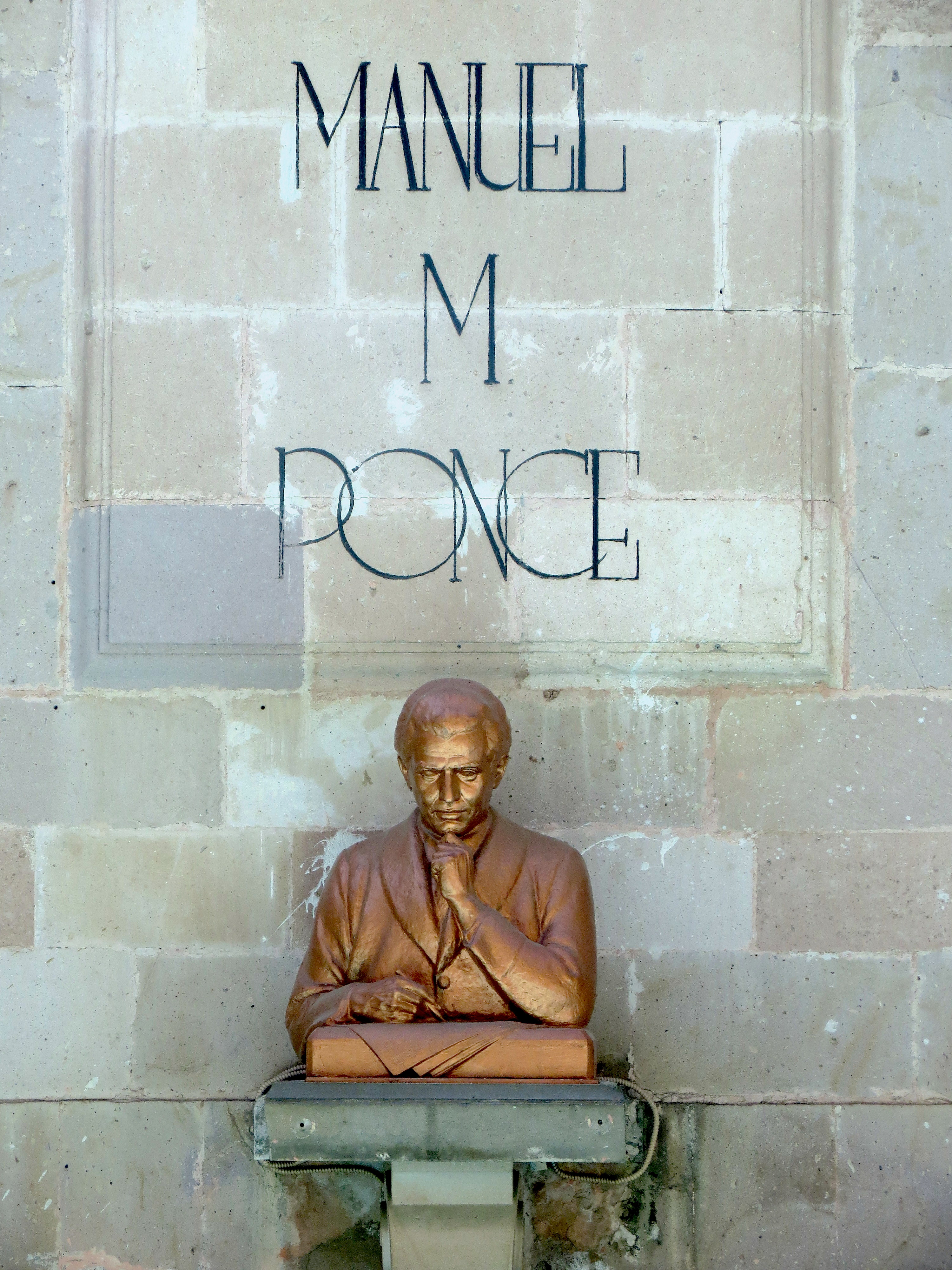 Esta escultura se encuentra detrás de la Exedra, en la Plaza de la Patria de Aguascalientes, y es similar a la escultura de la tumba del compositor en la Rotonda de los Hombres Ilustres.